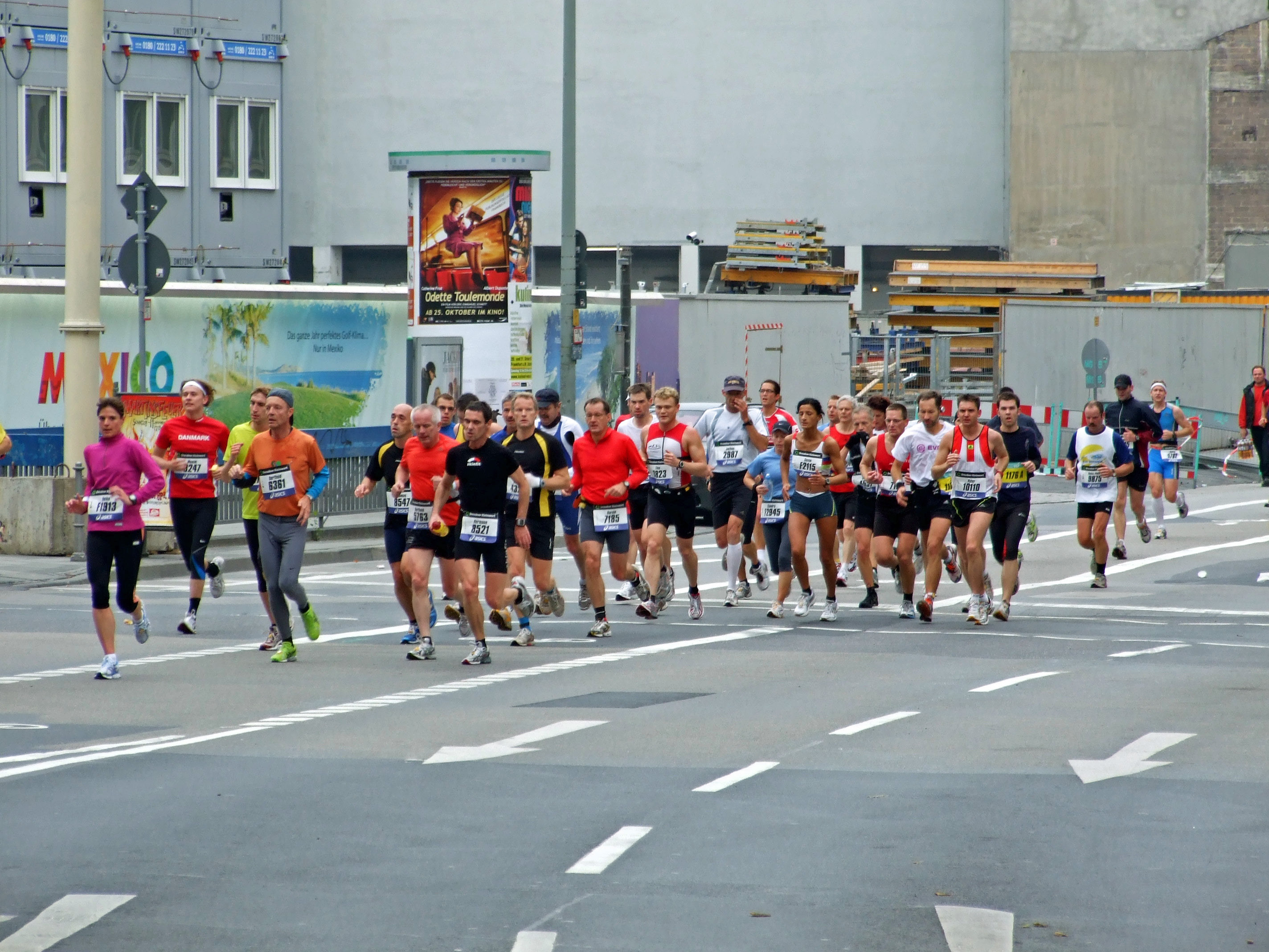 Das Läuferfeld, ca. 10 km nach dem Start beim Frankfurt-Marathon, 2007 in Ffm